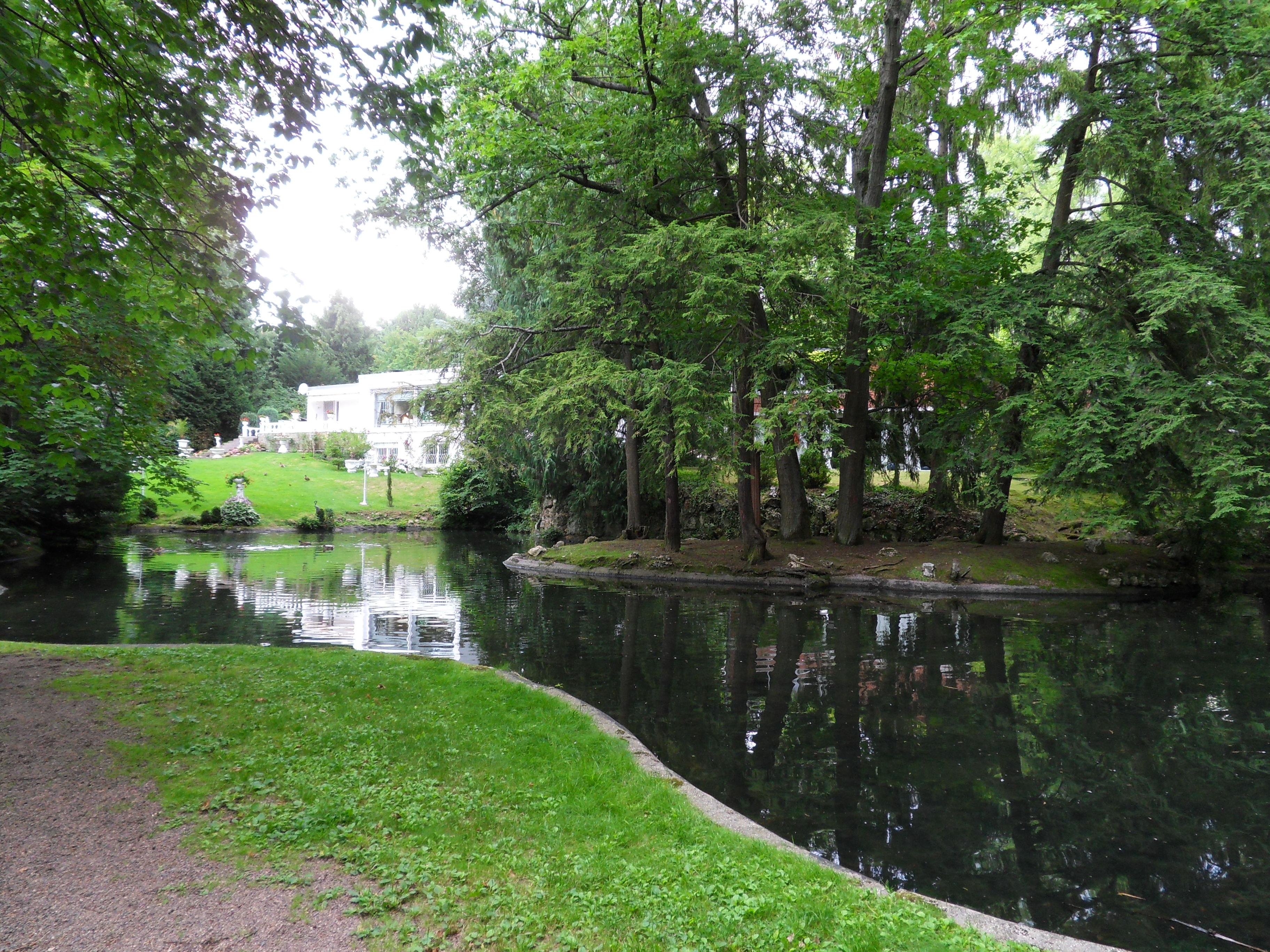 Blick von Südosten über den mittleren Schlossweiher von Hohenbuchau in Georgenborn mit künstlicher Insel. Im Hintergrund die nach 1961 im Park entstandene Wohnbebauung